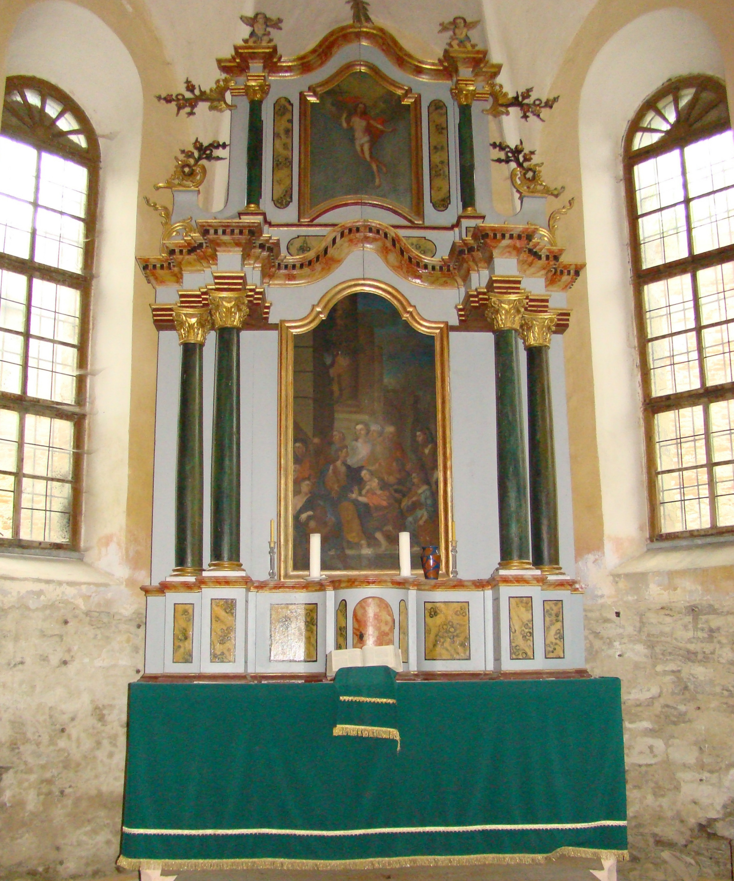 Biserica evanghelică fortificată, sat Agârbiciu; comuna Axente Sever, județul Sibiu 01